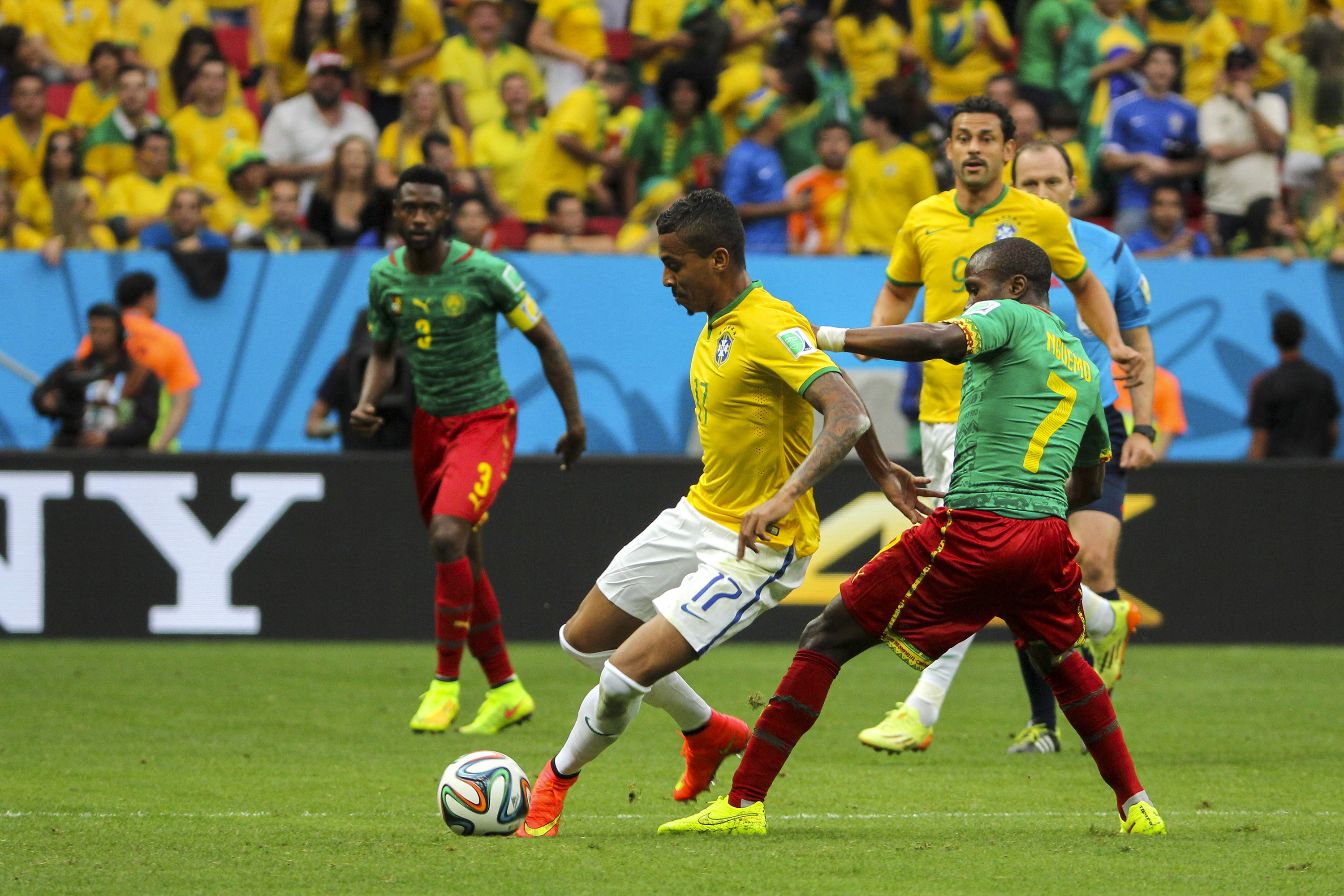 Brasil x Camarões, no Estádio Nacional Mané Garrincha em Brasília.